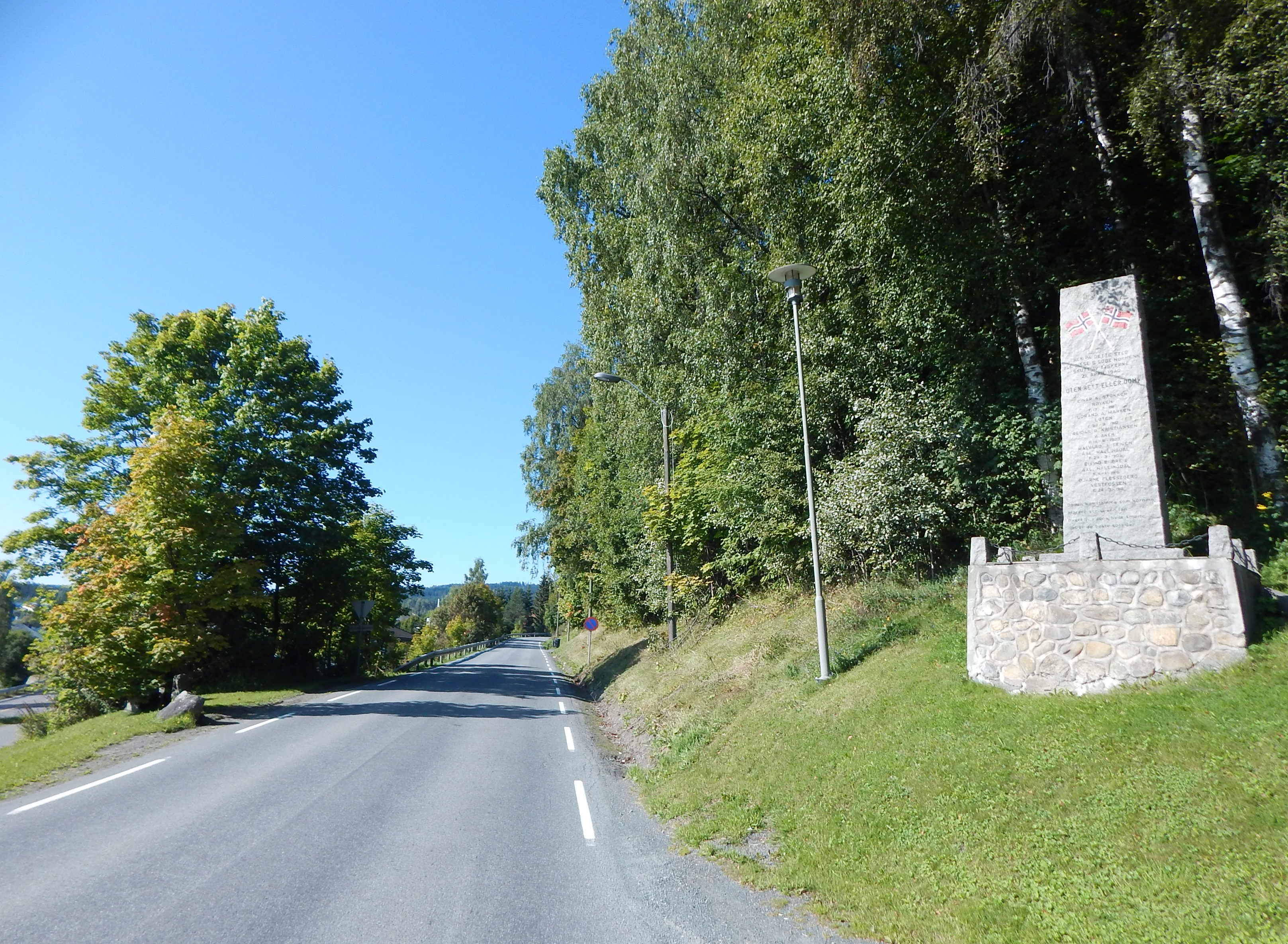 Krigsminnesmerke ved Odnesvegen